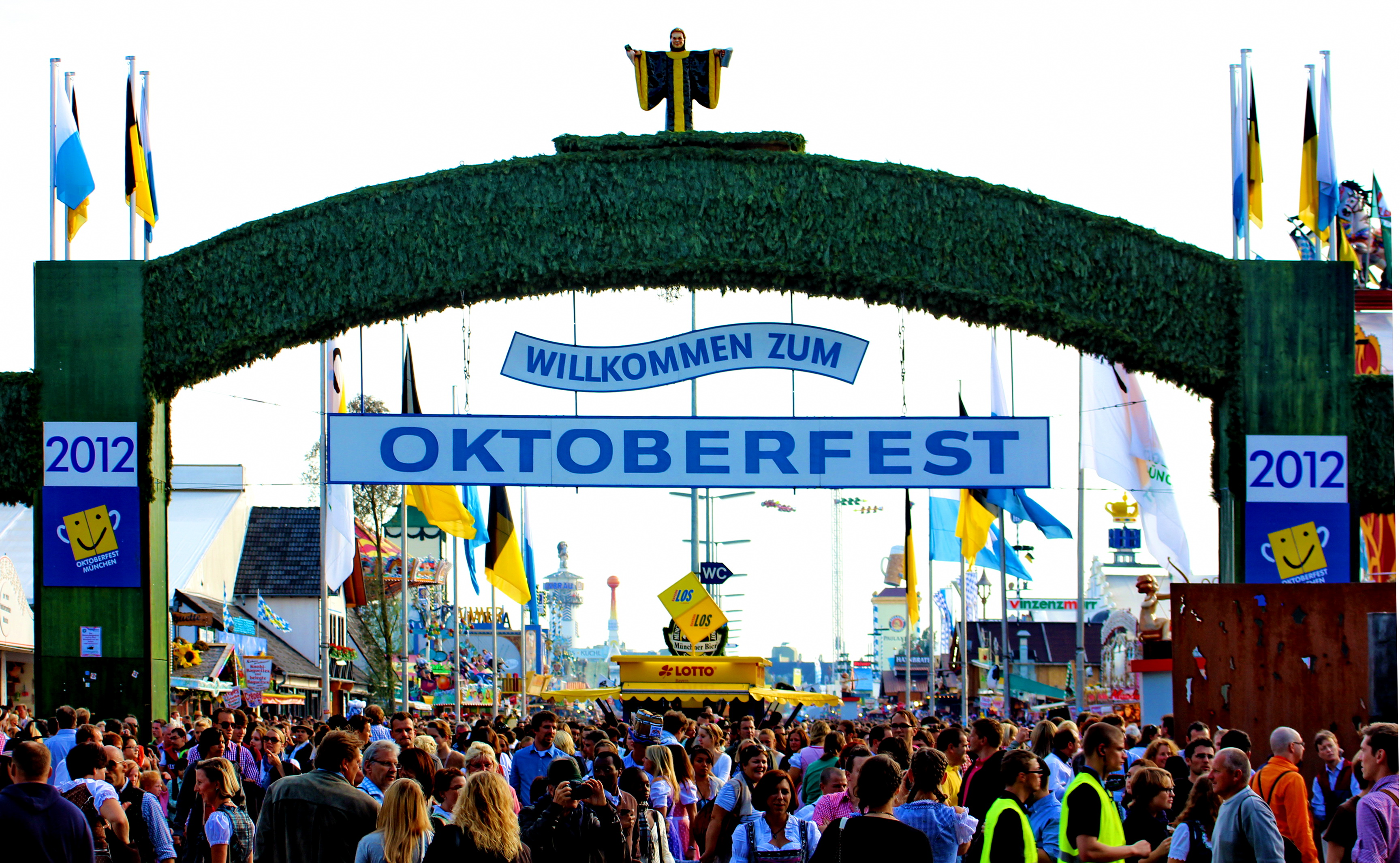 Haupteingang Oktoberfest 2012.